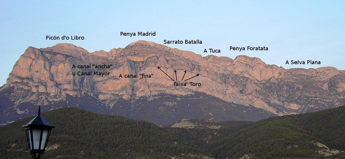 Aragonés: Toponimia prencipal en a Penya Montanyesa.